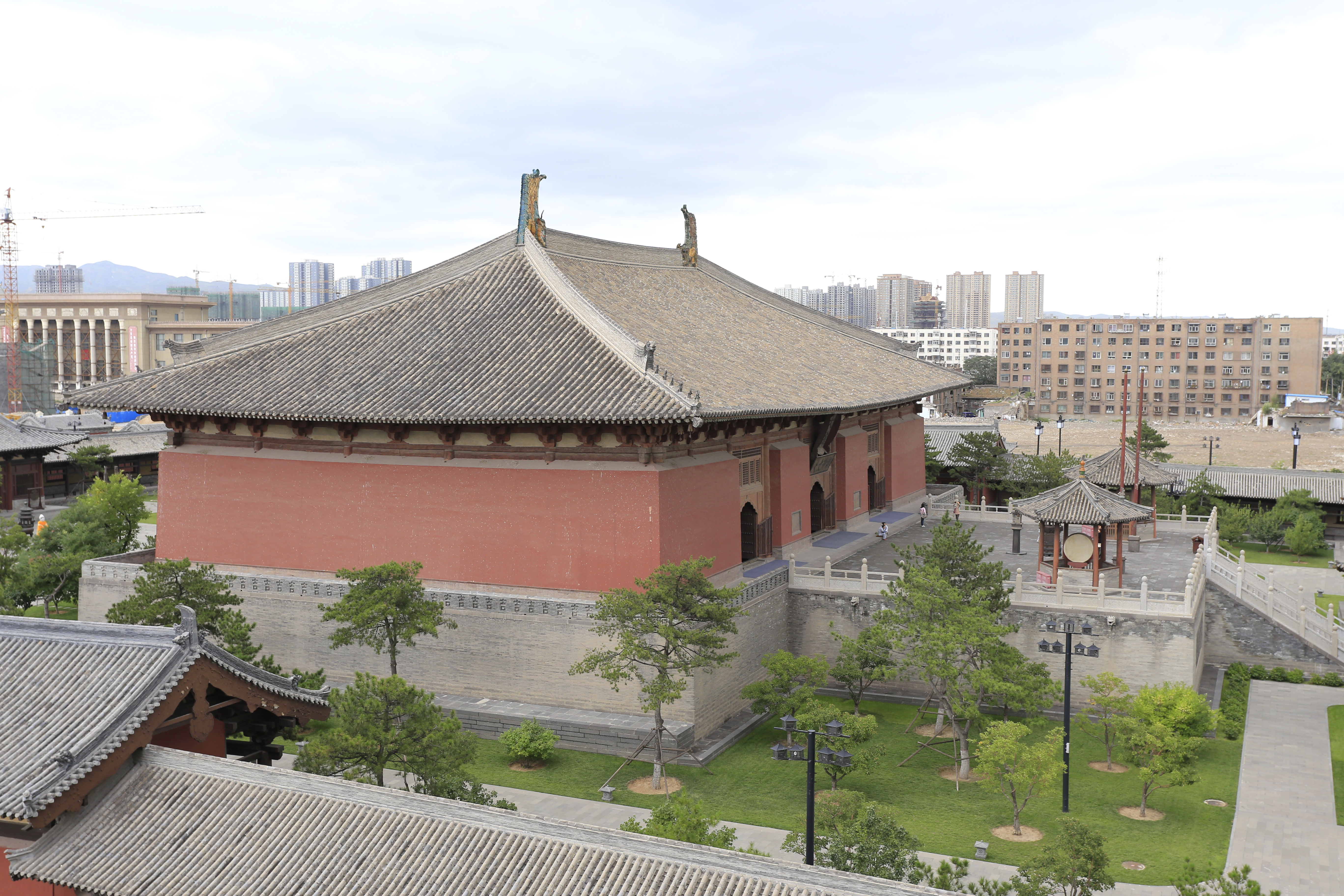 大同华严寺—— 华严宝塔上俯瞰大雄宝殿